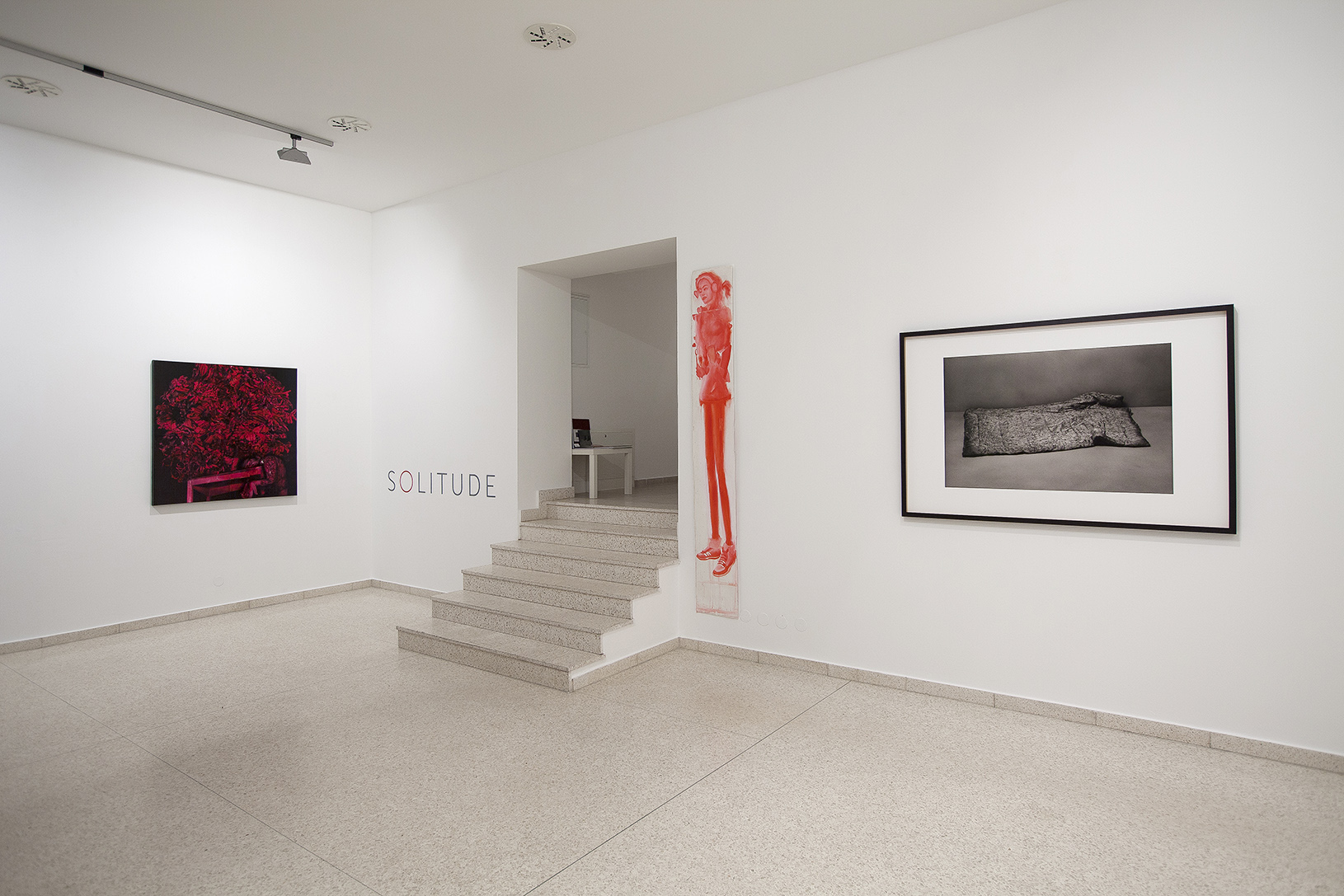 výstava Ivana Pinakvy